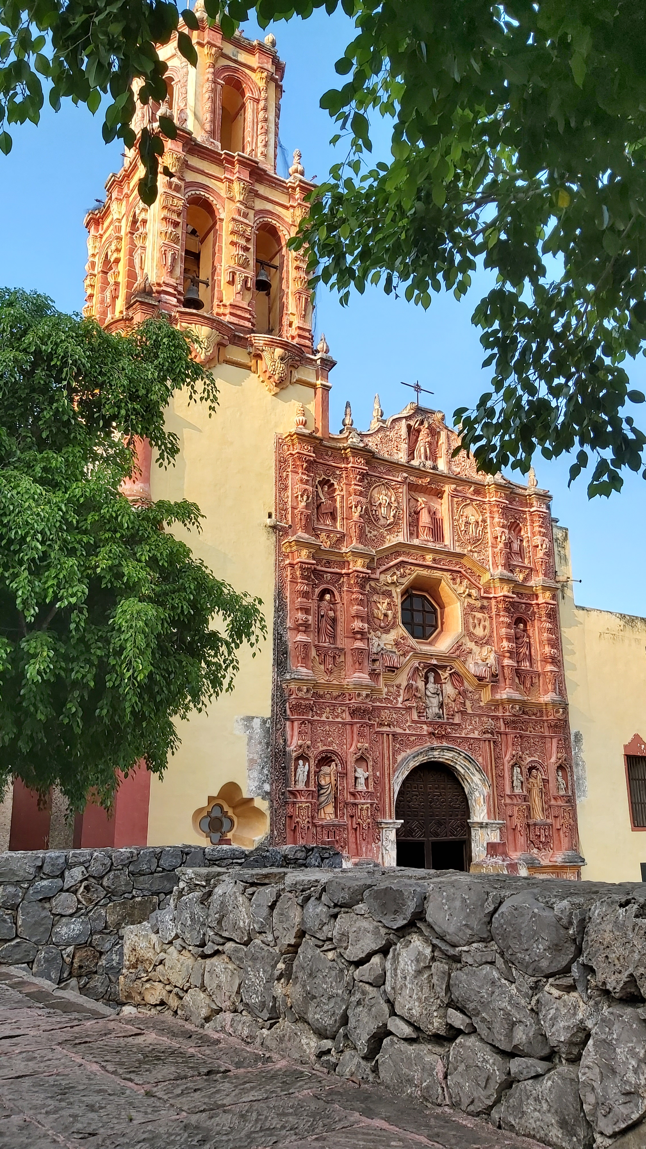 Misión Santa María del Agua de Landa ubicada en Landa de Matamoros, pueblo mágico en el estado de Querétaro, México.